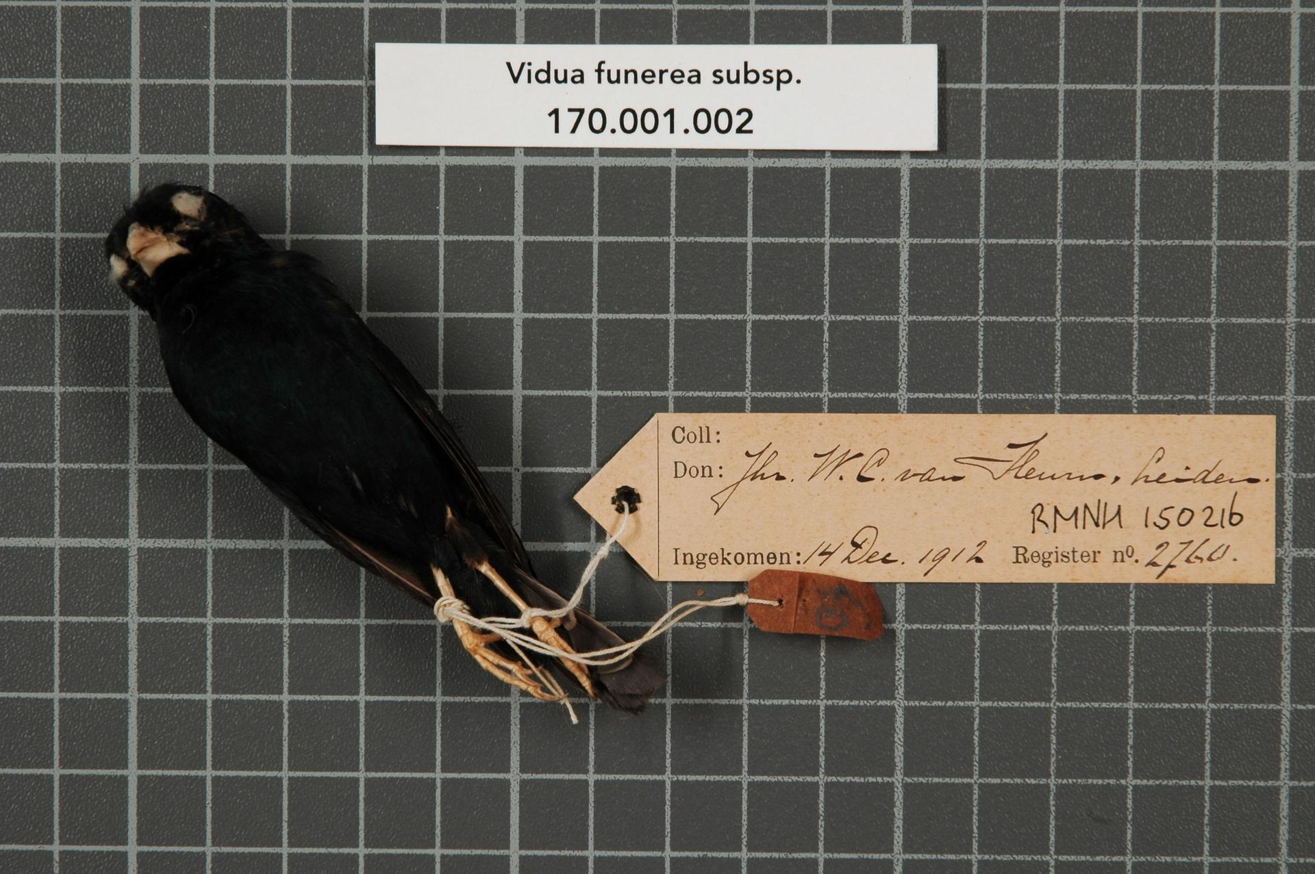 Presua funerea subsp.